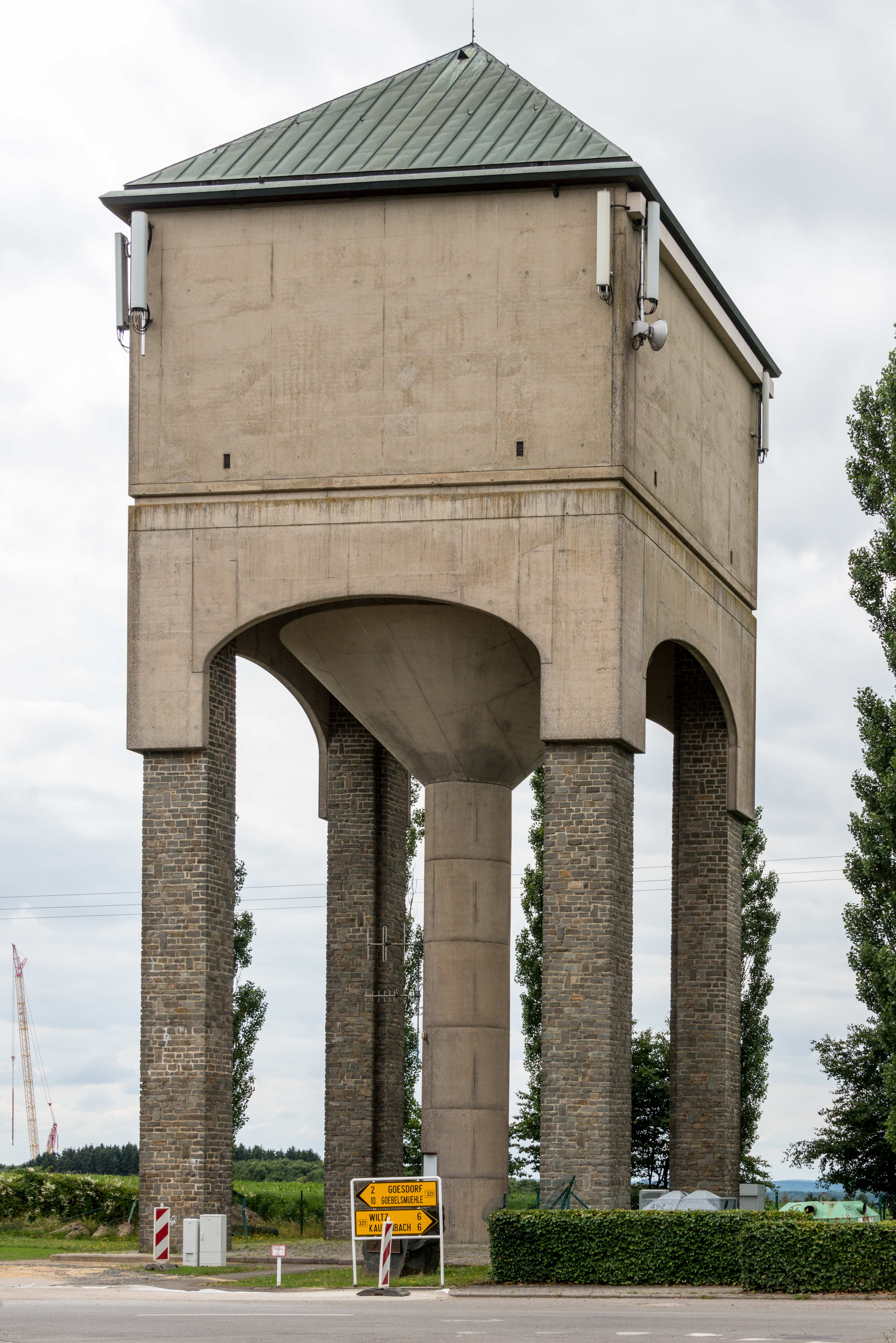 De Waassertuerm zu Dol.